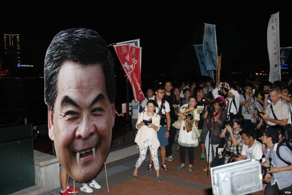 學聯發起抗議梁振英拒絕對話公民抗命遊行和留守禮賓府